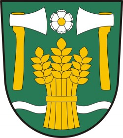 Příseka